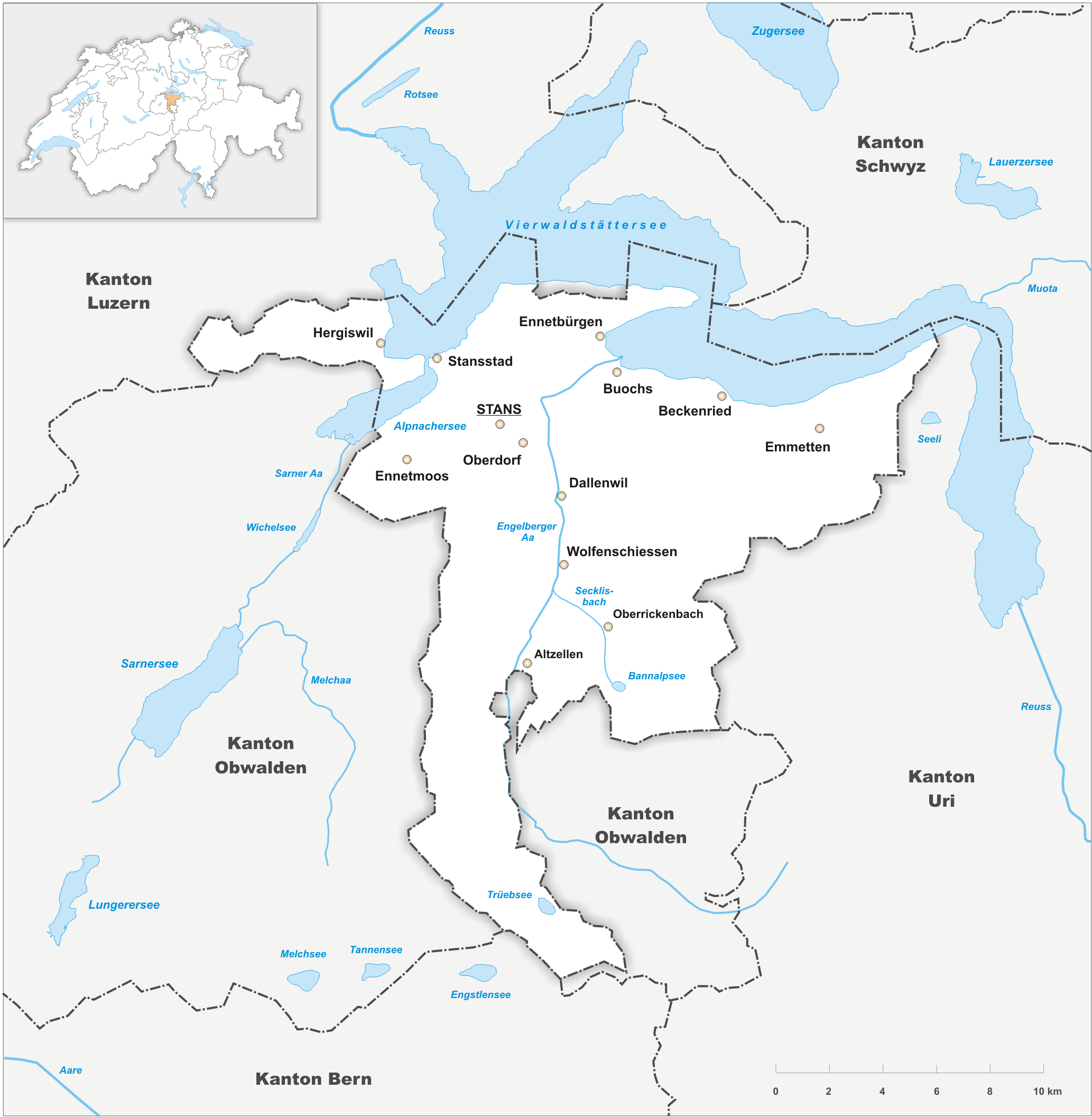 Karte des Kanton Nidwalden.